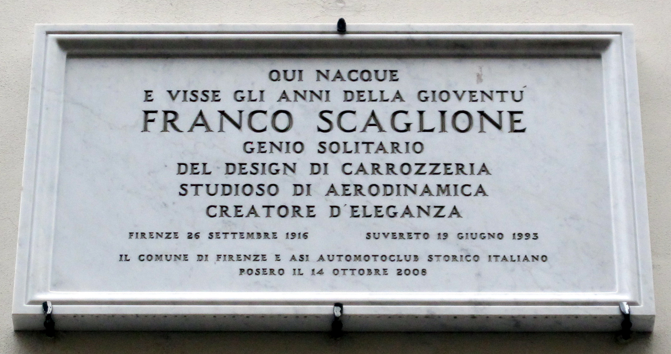 Via fiesolana 26, casa di franco scaglione, targa